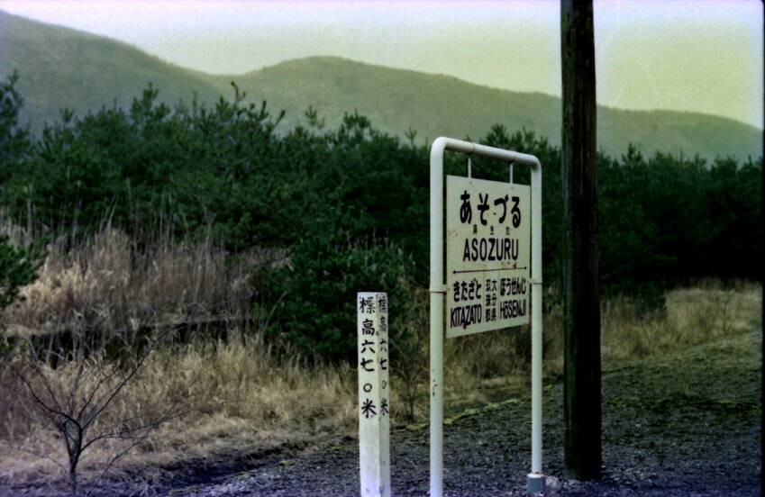 国鉄宮原線麻生釣駅